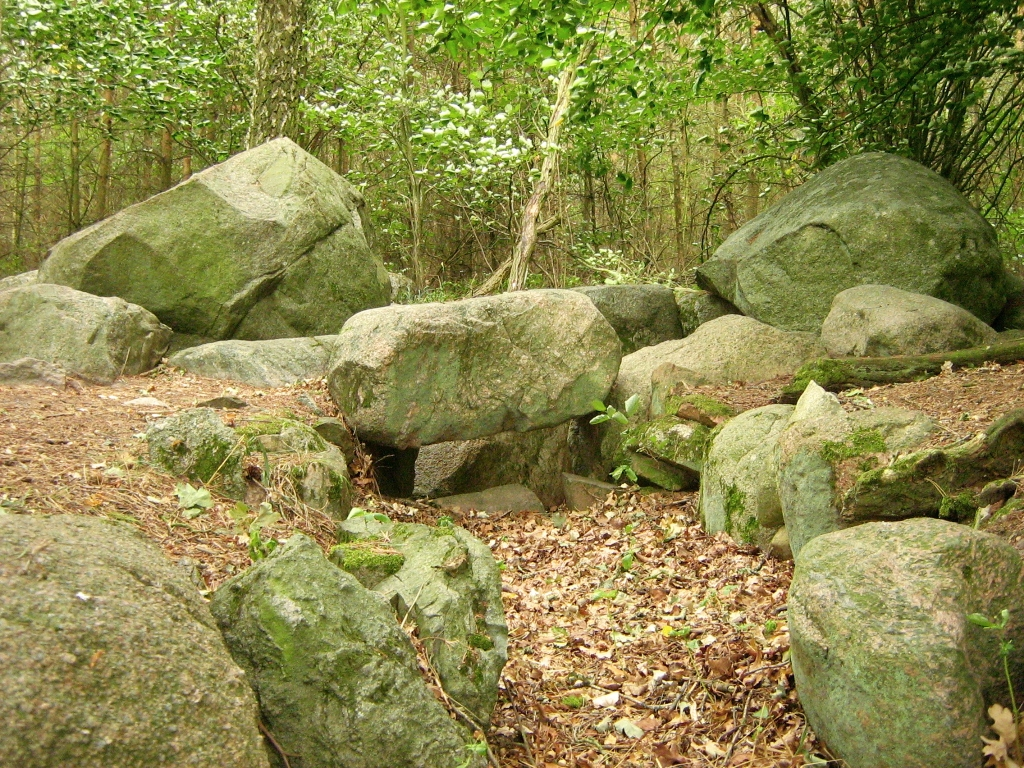 Offengelegter Gang zur Grabkammer eines Megalithgrabes der Jungsteinzeit (3000 - 1800 v.Chr.) im Wald an der Oberkante der südlichen Flussterrasse der Recknitz bei Liepen in der Gemeinde Thelkow im Landkreis Bad Doberan, Mecklenburg. Object location54° 04′ 08.73″ N, 12° 35′ 22.41″ E